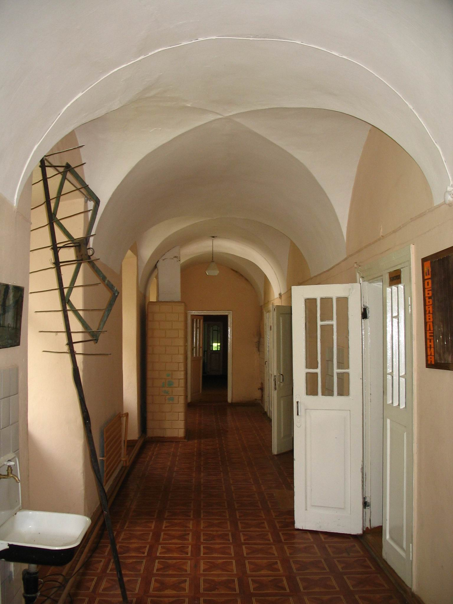 Беларуская (тарашкевіца): Кляштар місіянэраў (Лыскава). Калідор на другім паверхе. This is a photo of Belarusian heritage monument. Reference number: 112Г000621 ( WLM)